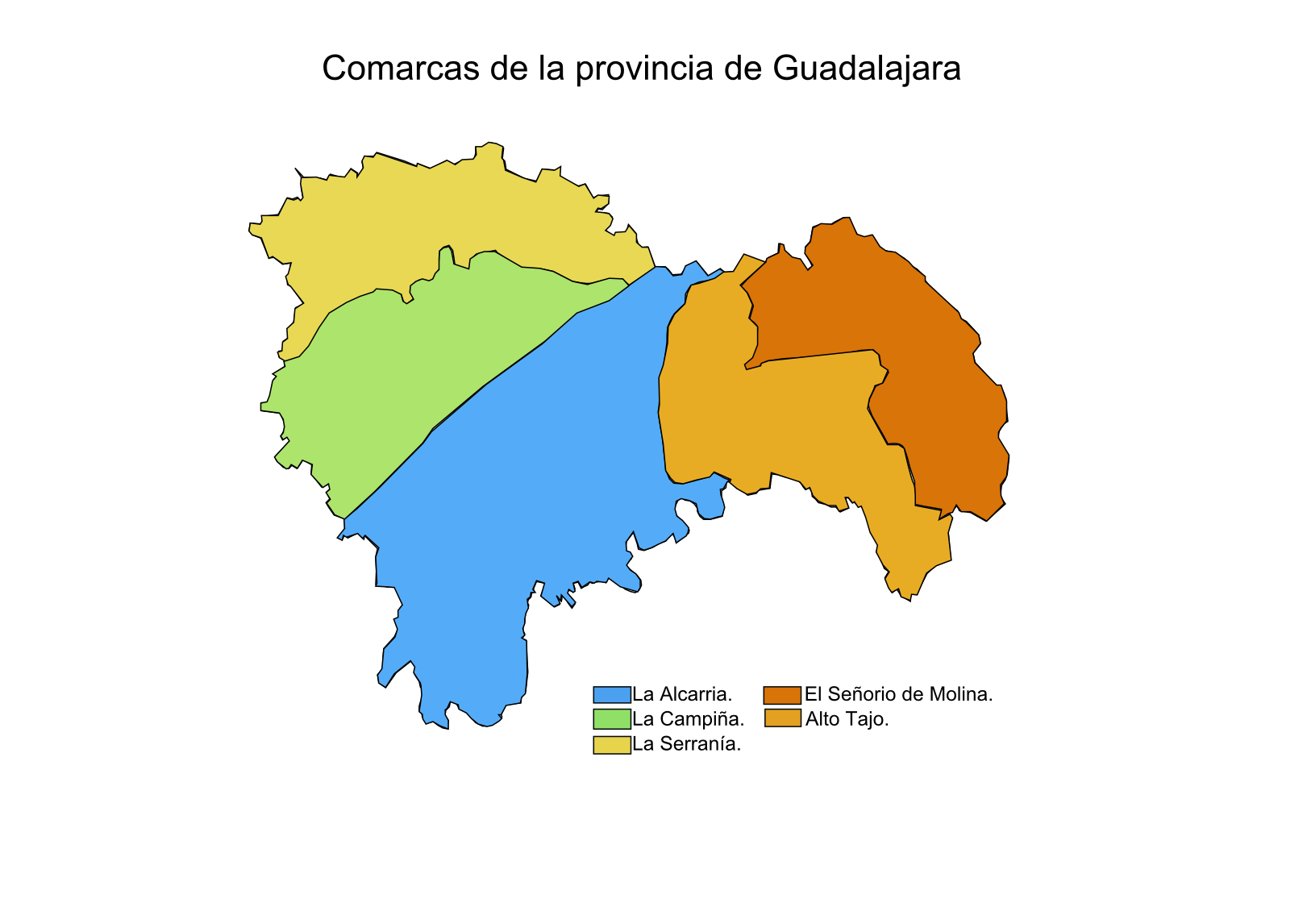 Comarcas de la provincia de Guadalajara, Castilla-La Mancha, España.